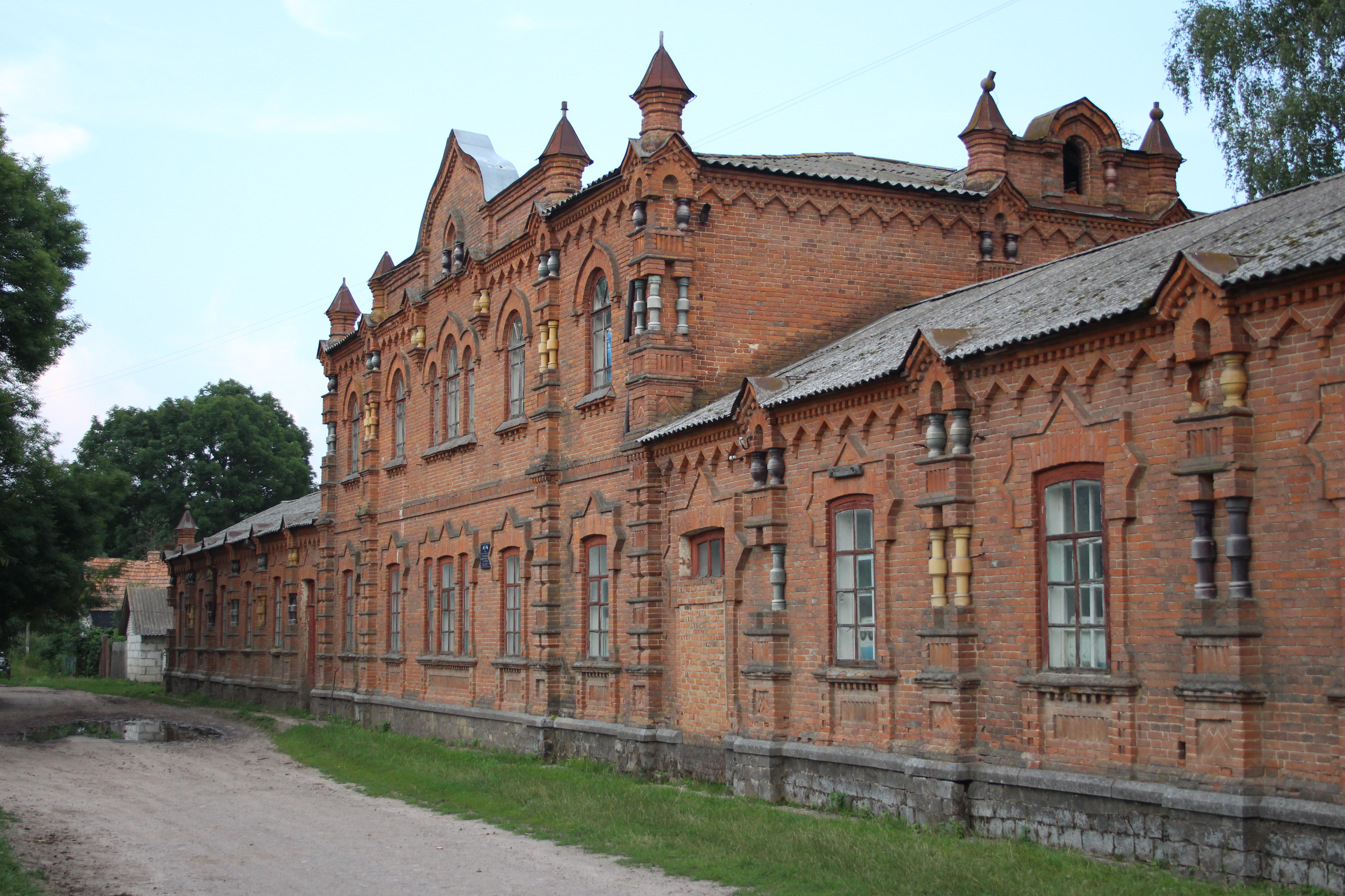 Богадільня Миклашевських, Путивльський район, с. Волокитине